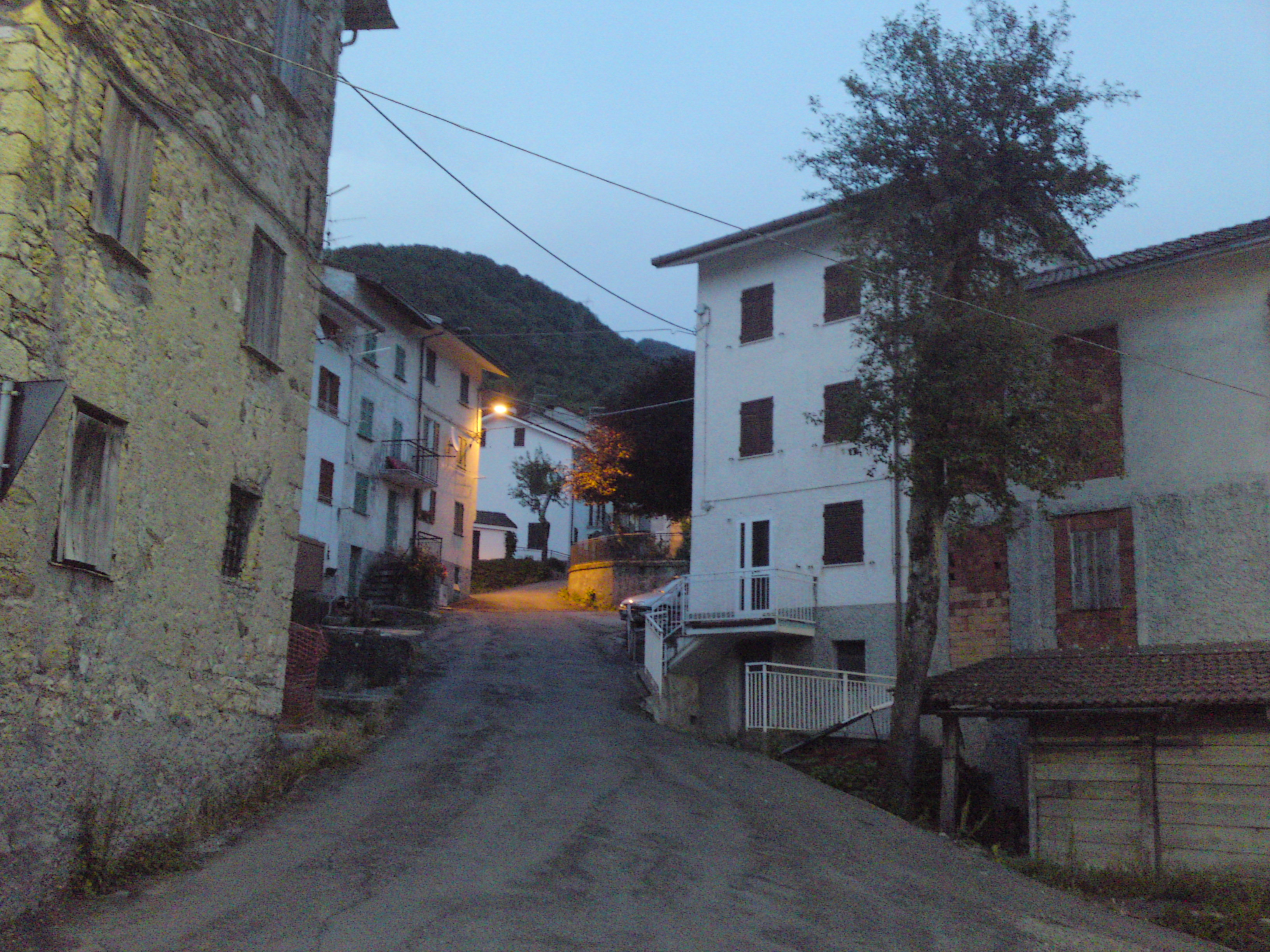 Casoni - Strada verso cadato